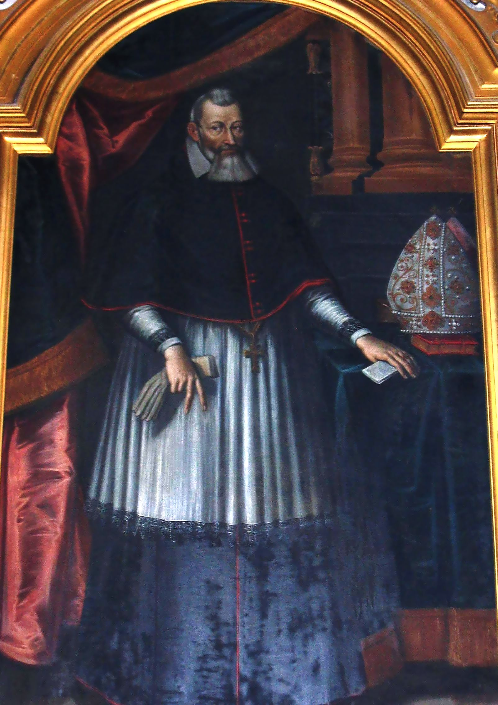 Marcin Szyszkowski Bishop of Kraków, anonymous portrait of XVII century image taken by user:Mathiasrex Maciej Szczepańczyk